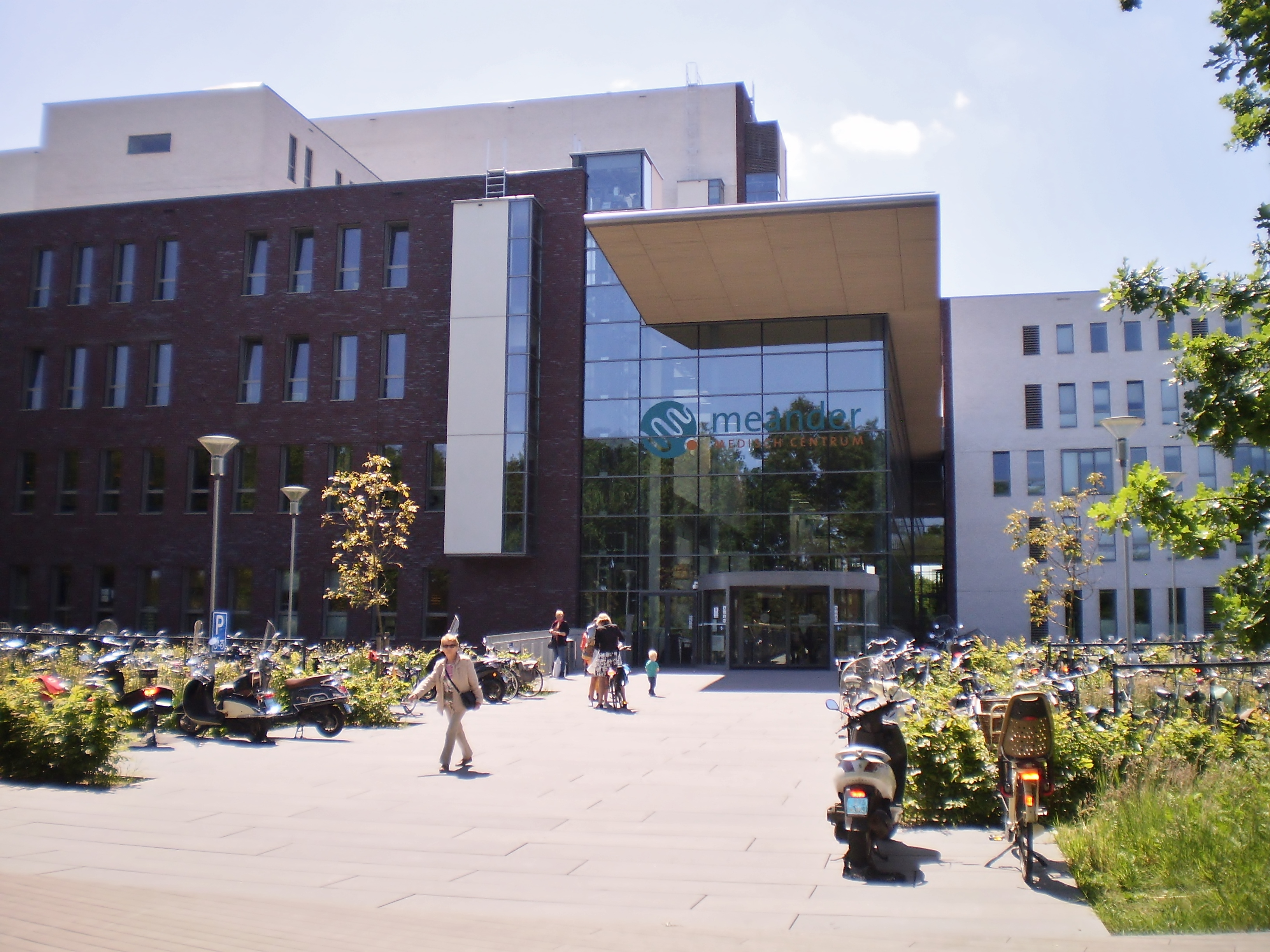 Meander MC hoofdingang